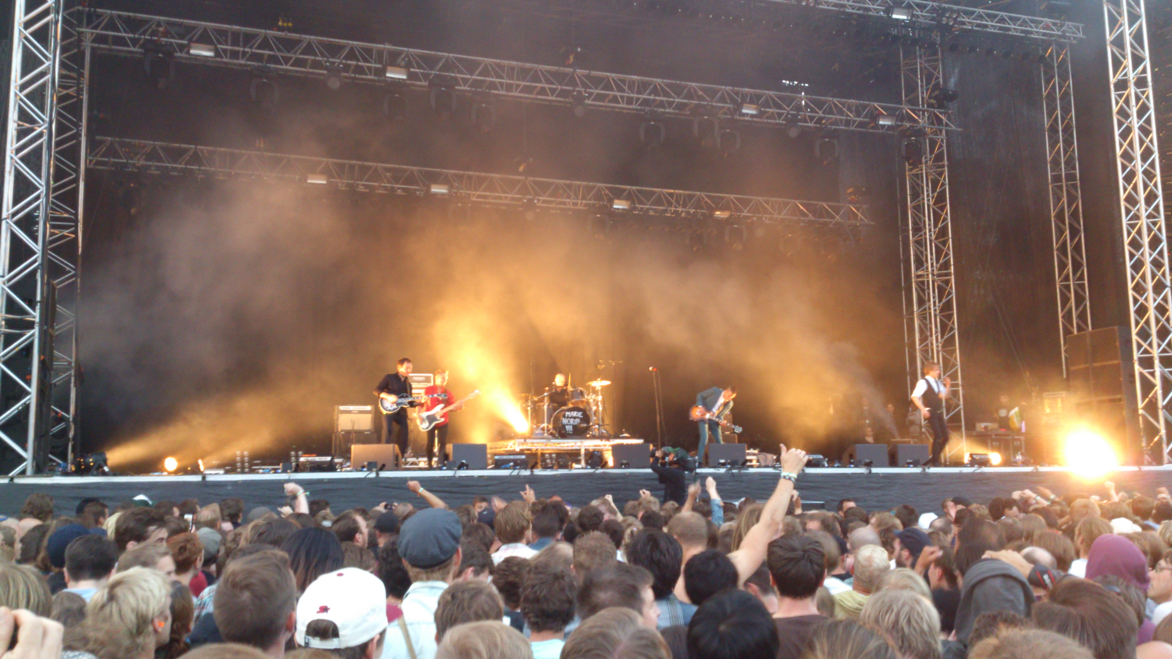 Le groupe Refused au festival Way Out West à Göteborg, Suède, le 9 août 2012.